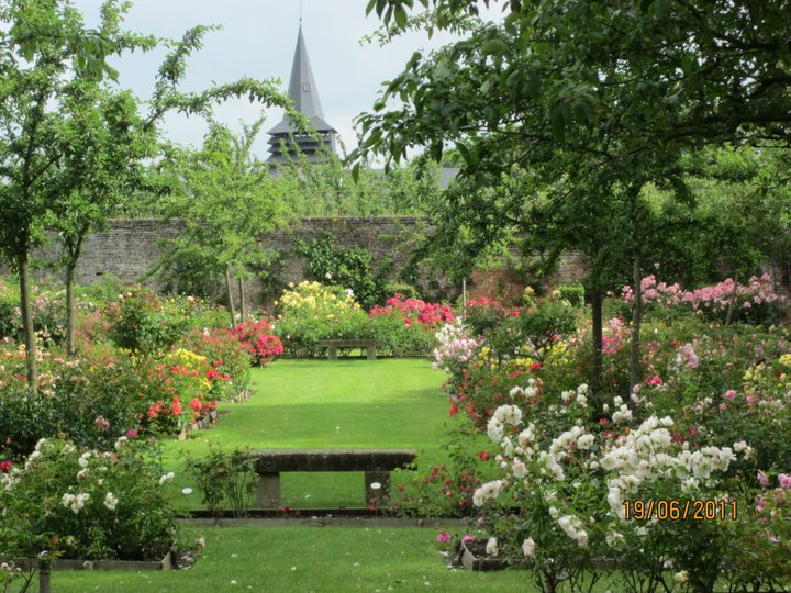 Vue de la roseraie